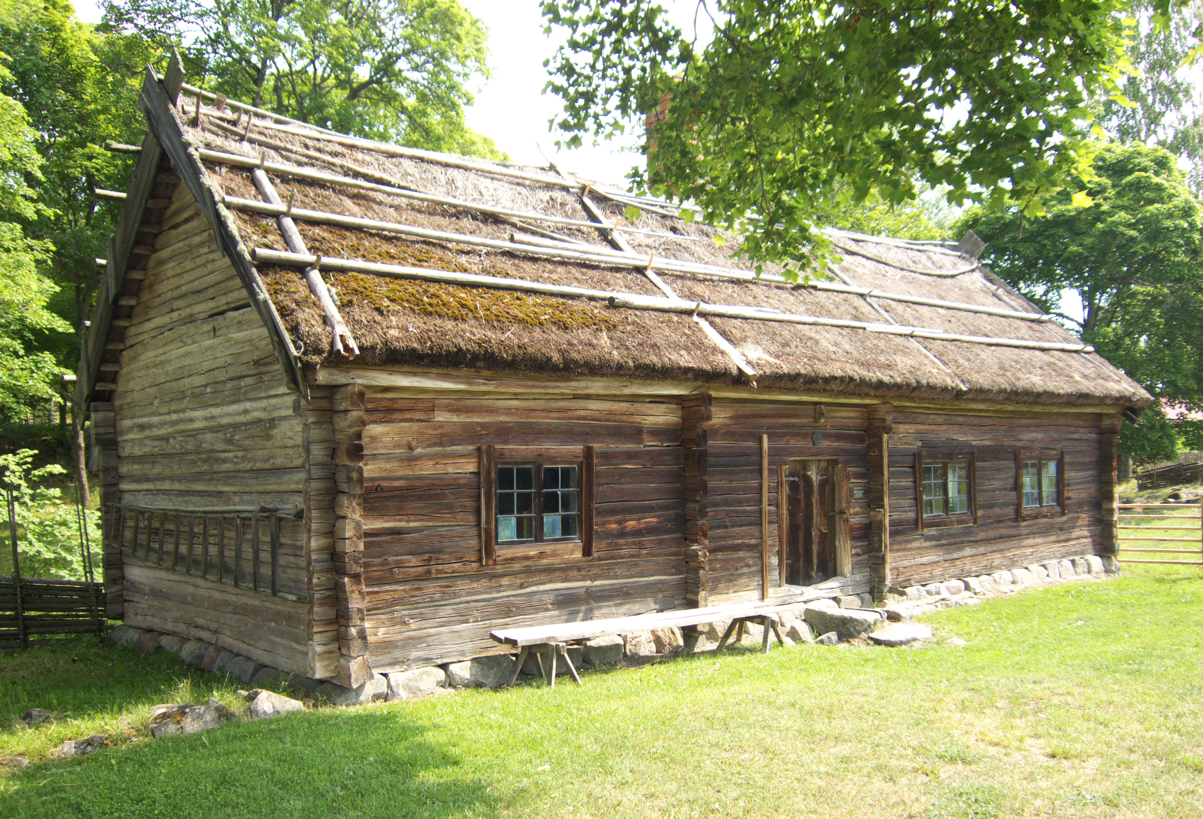 Kvekgården i Fröslunda socken - mangårdsbyggnaden